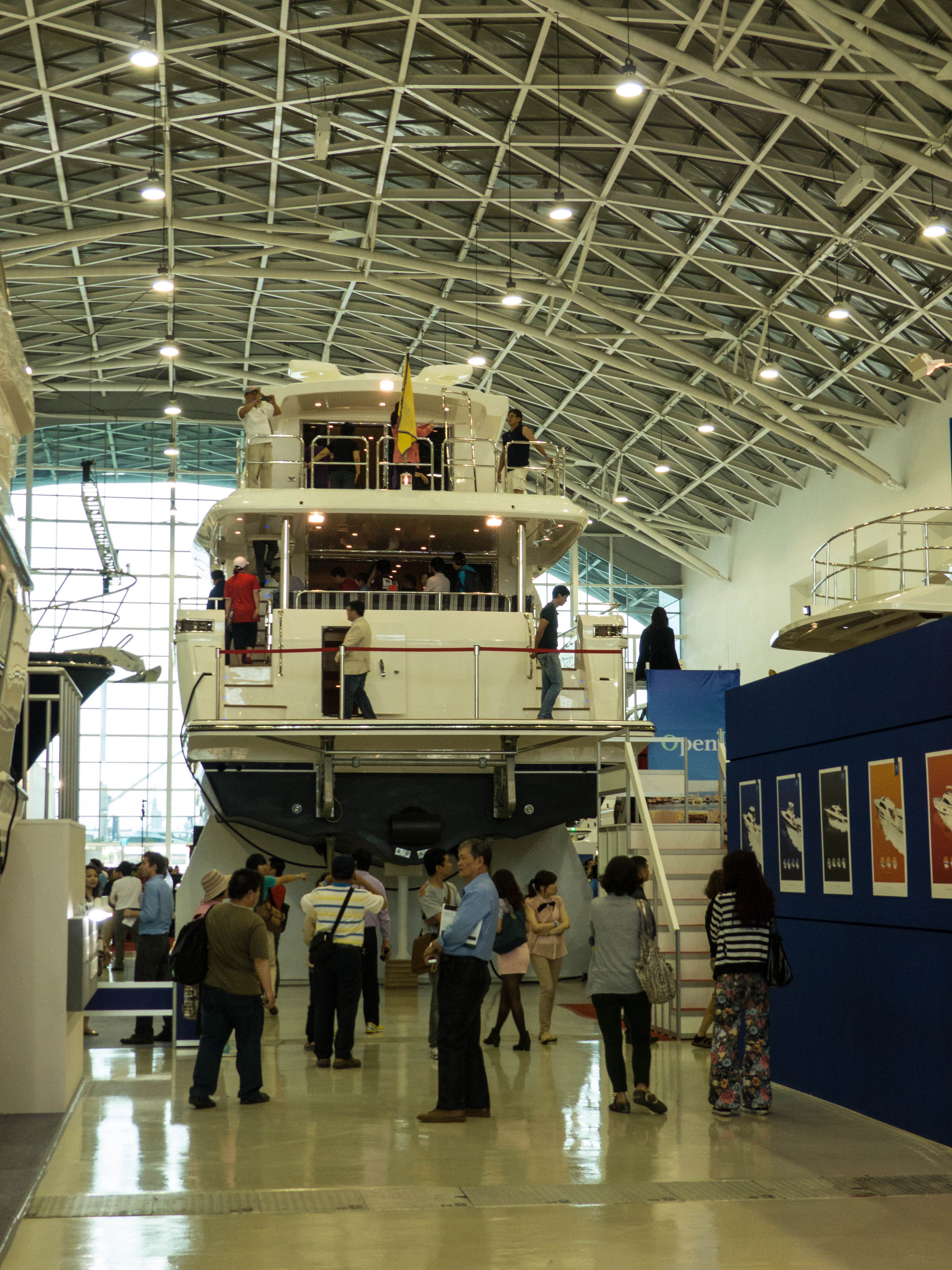 台灣國際遊艇展南展覽廳，強生造船攤位展示的遊艇艇尾。